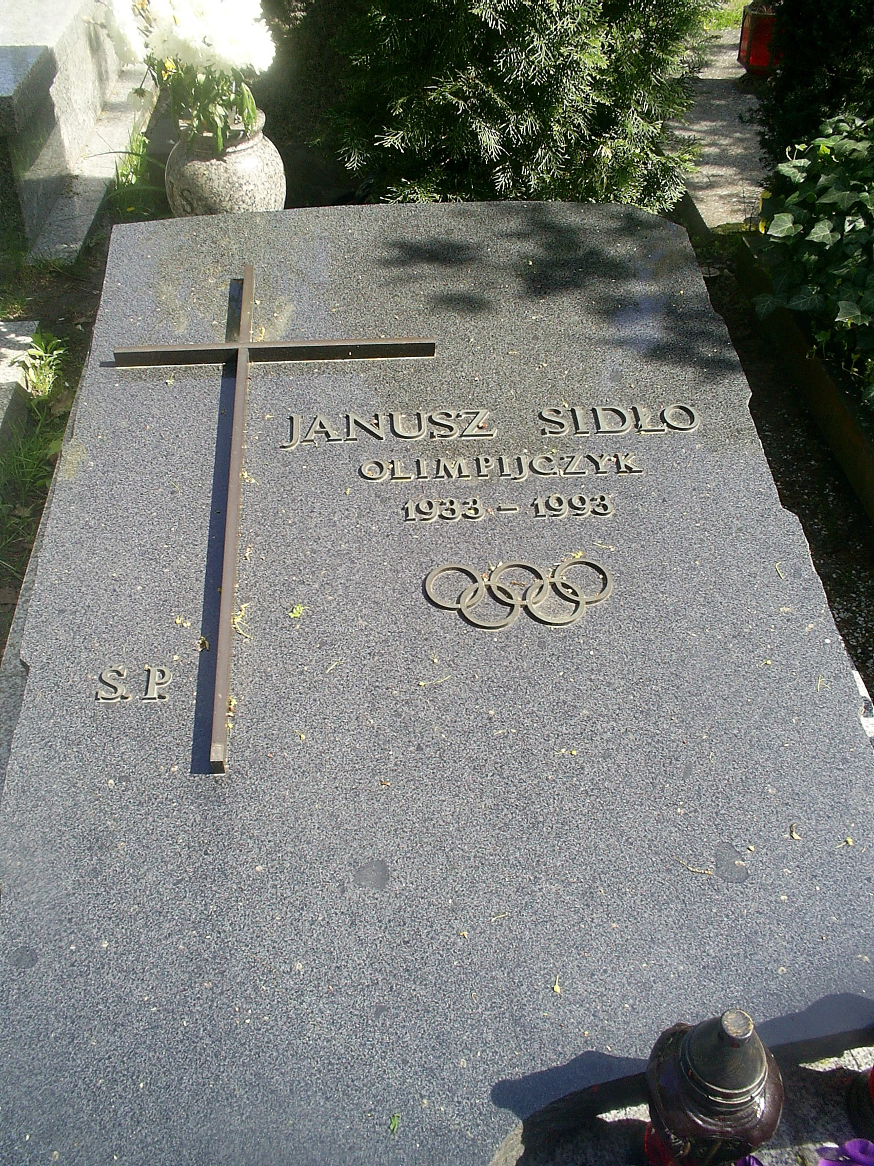 Janusz Sidło - grób Powązki